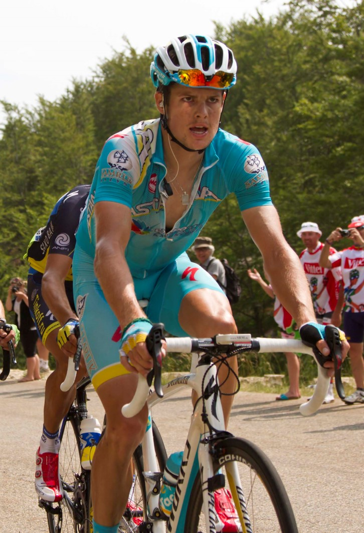 034 fuglsang en ten dam